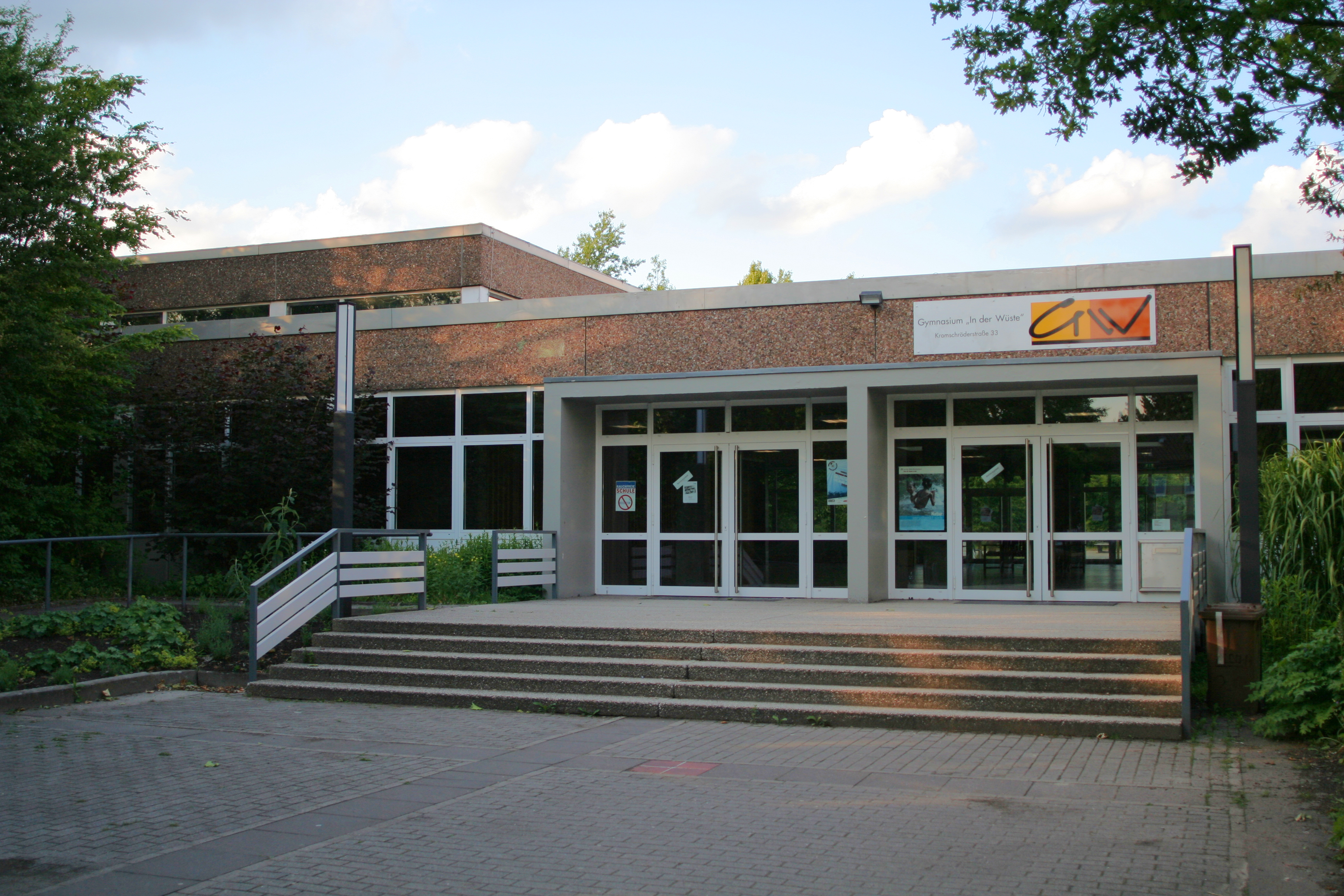 Das Gymnasium „In der Wüste“ in Osnabrück, Haupteingang